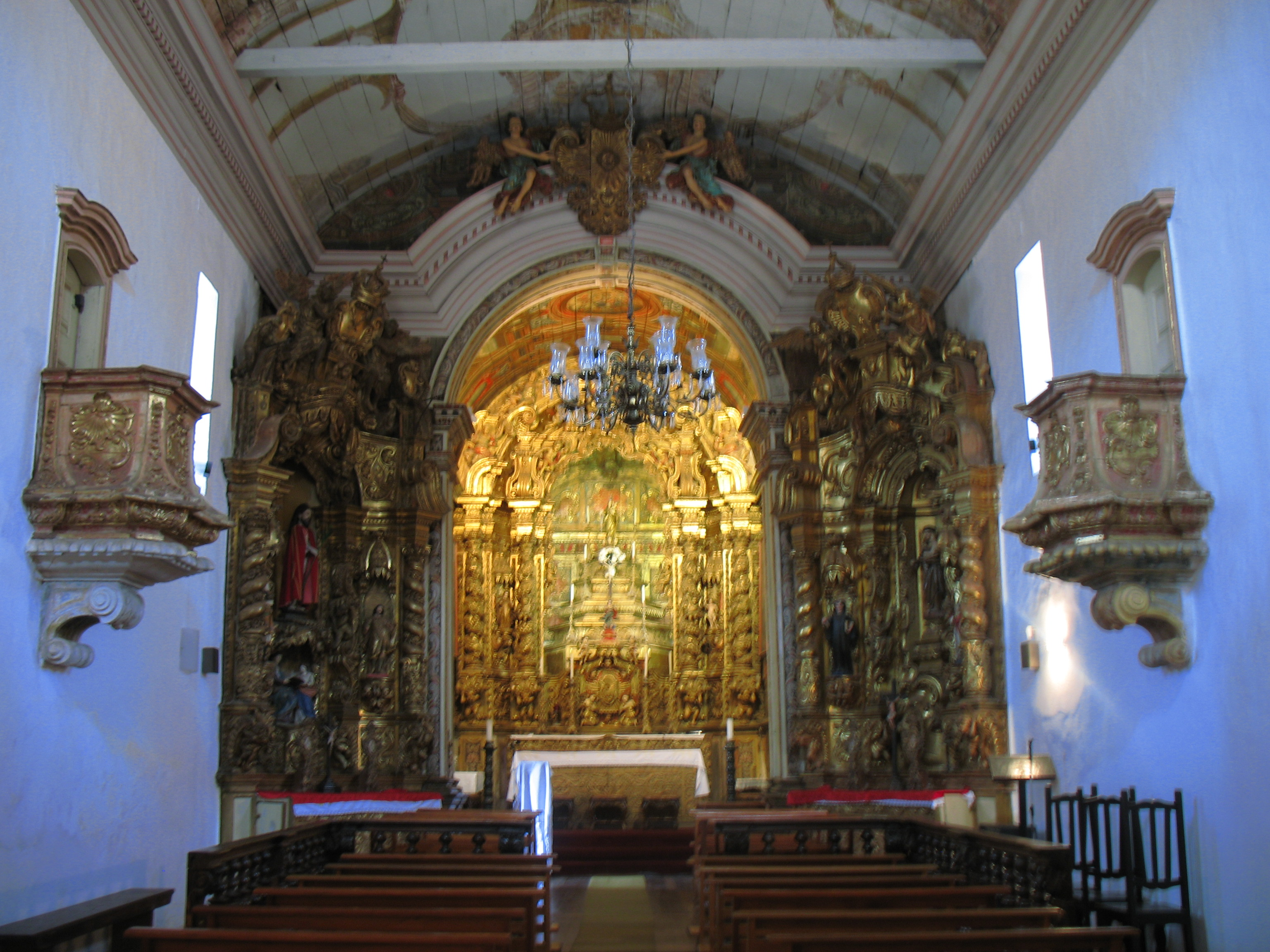 Capela de Nossa Senhora do [arraial do] Padre Faria Ouro Preto, c. 1740 [1710] Nave